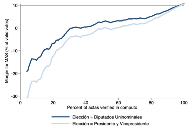 El margen del MAS aumento constantemente durante la mayor parte del conteo oficial a medida que se verificaban mas actas